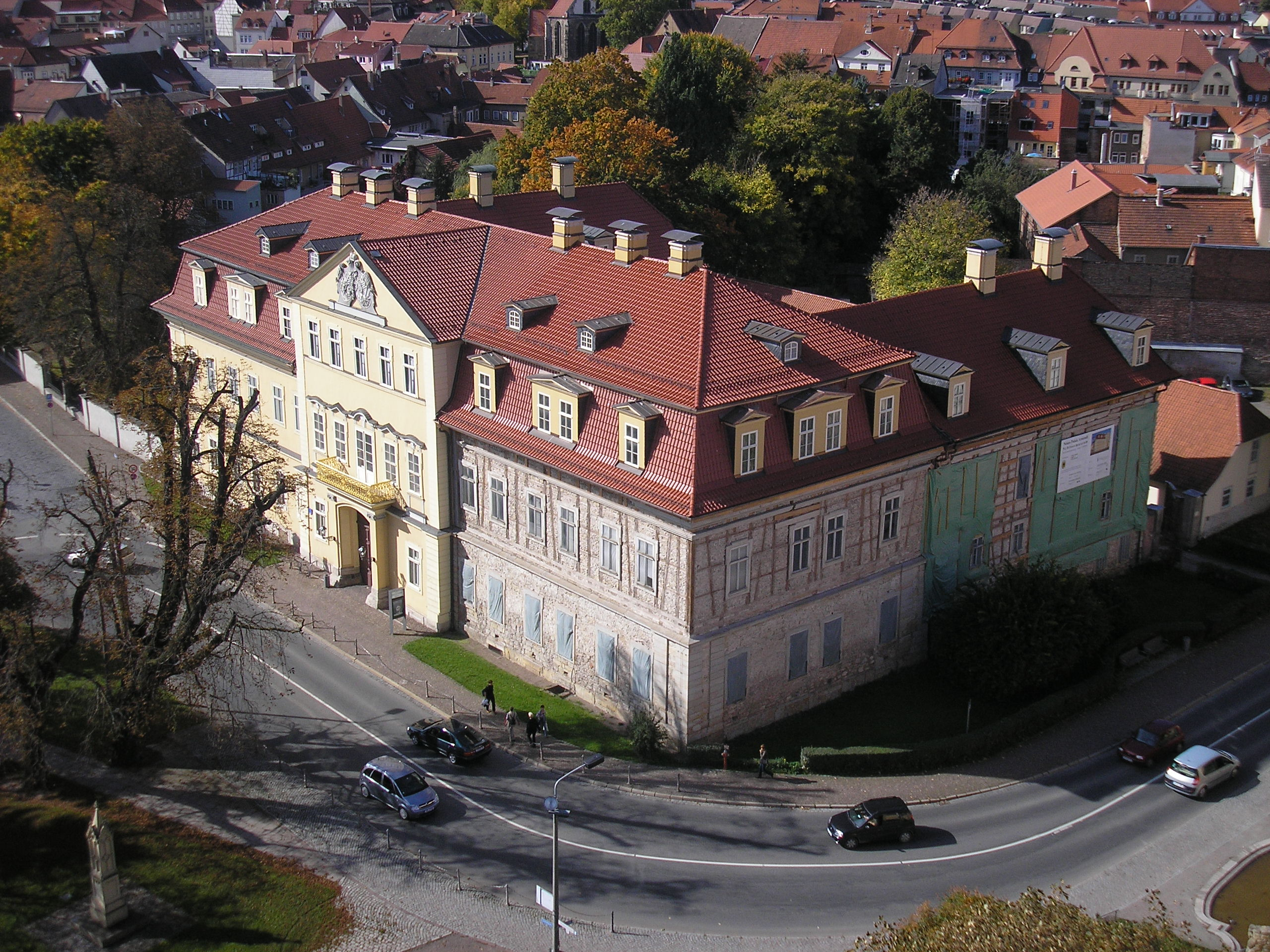 Das Neue Palais in Arnstadt (Thüringen).